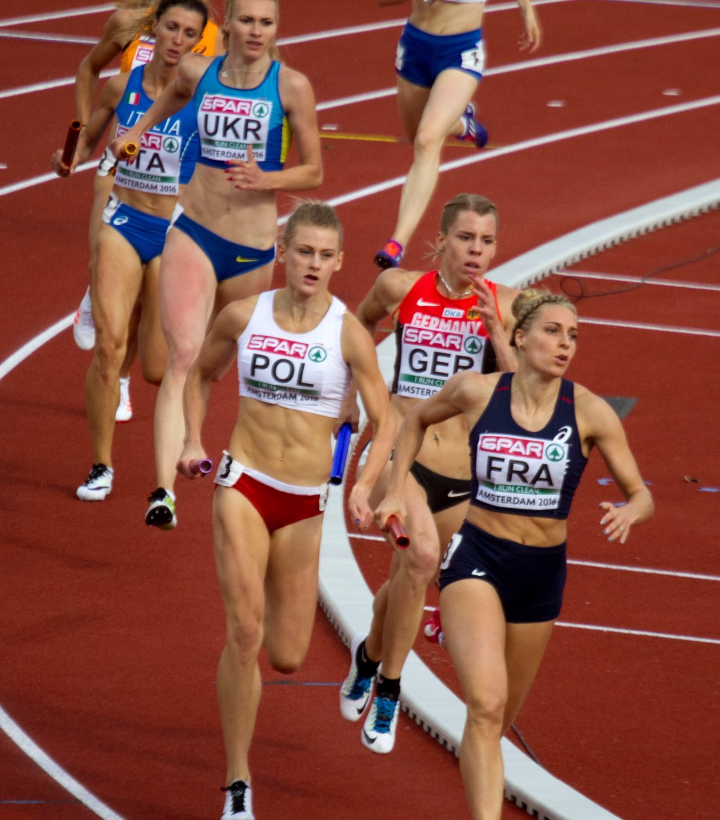 813 4x400m dames